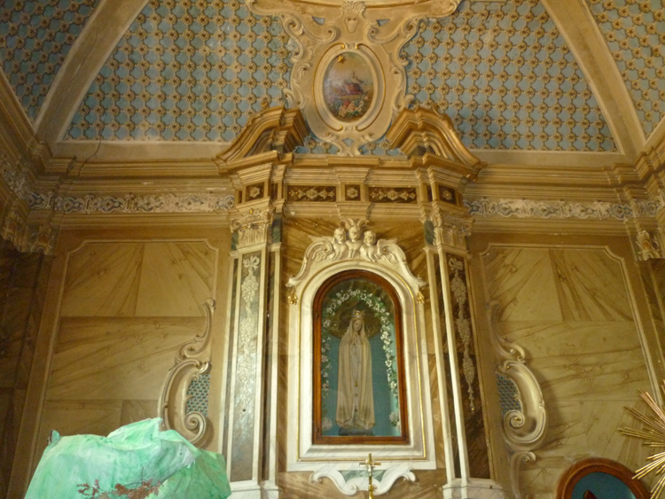 San Giovanni in Fiore - Chiesa Madre, cappella della Madonna di Fatima